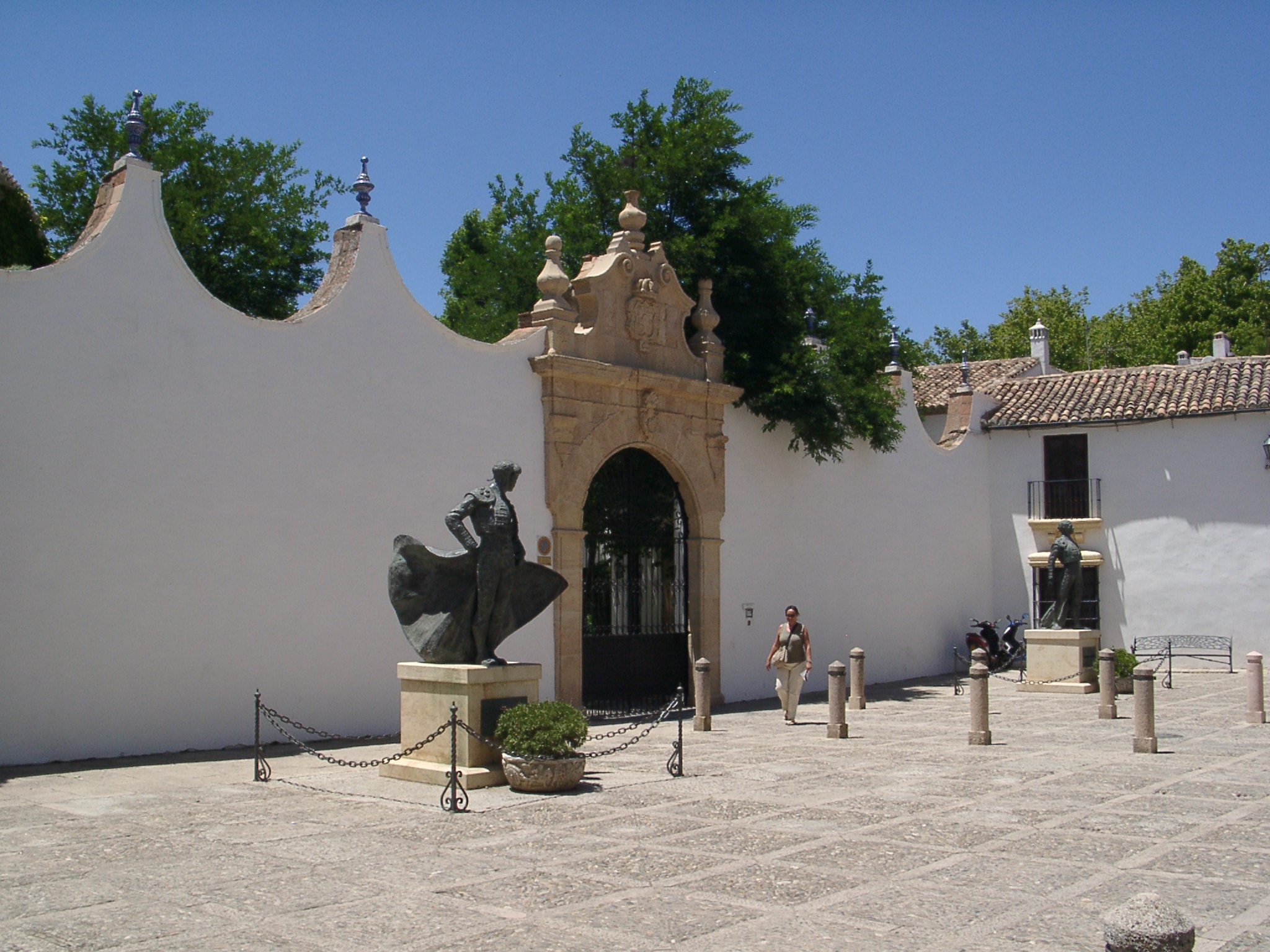 Ronda, Stierkampfarena